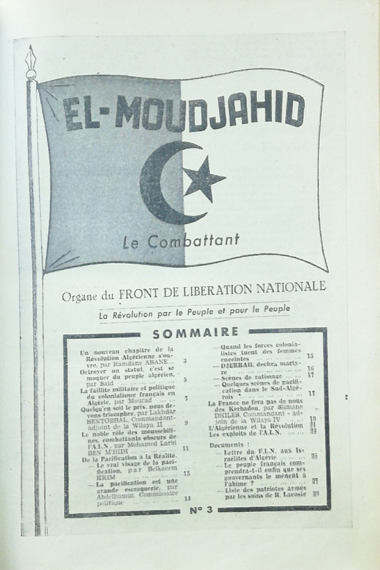 El Moudjahid Fr (03) - 09-1956 - Un nouveau chapitre de la Révolution algérienne s'ouvre